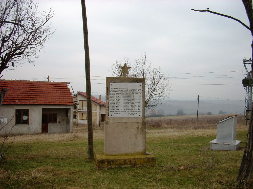 Spomenik u Obiliću